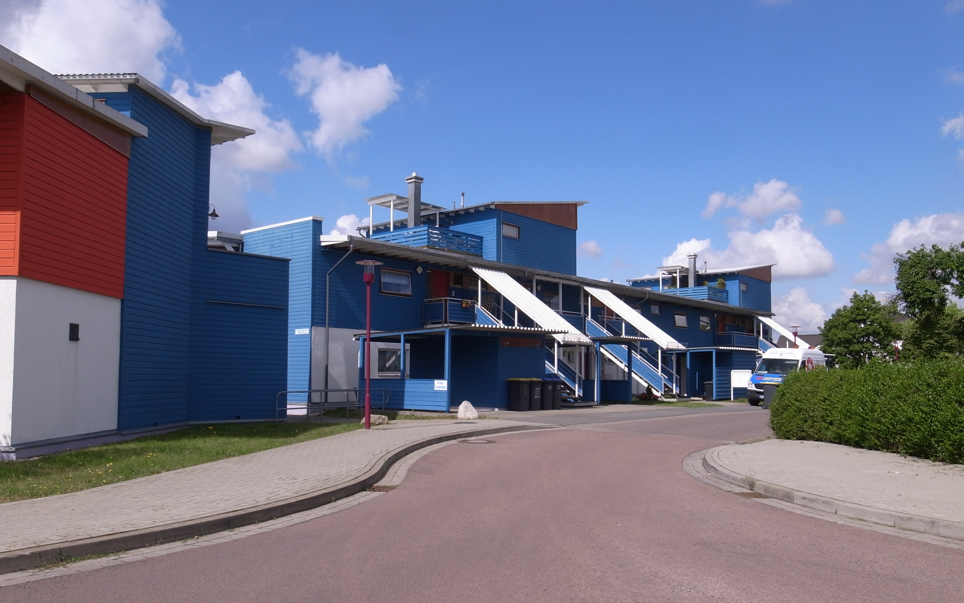 Europadorf Roßlau, Teilansicht vom Beitrag aus Österreich